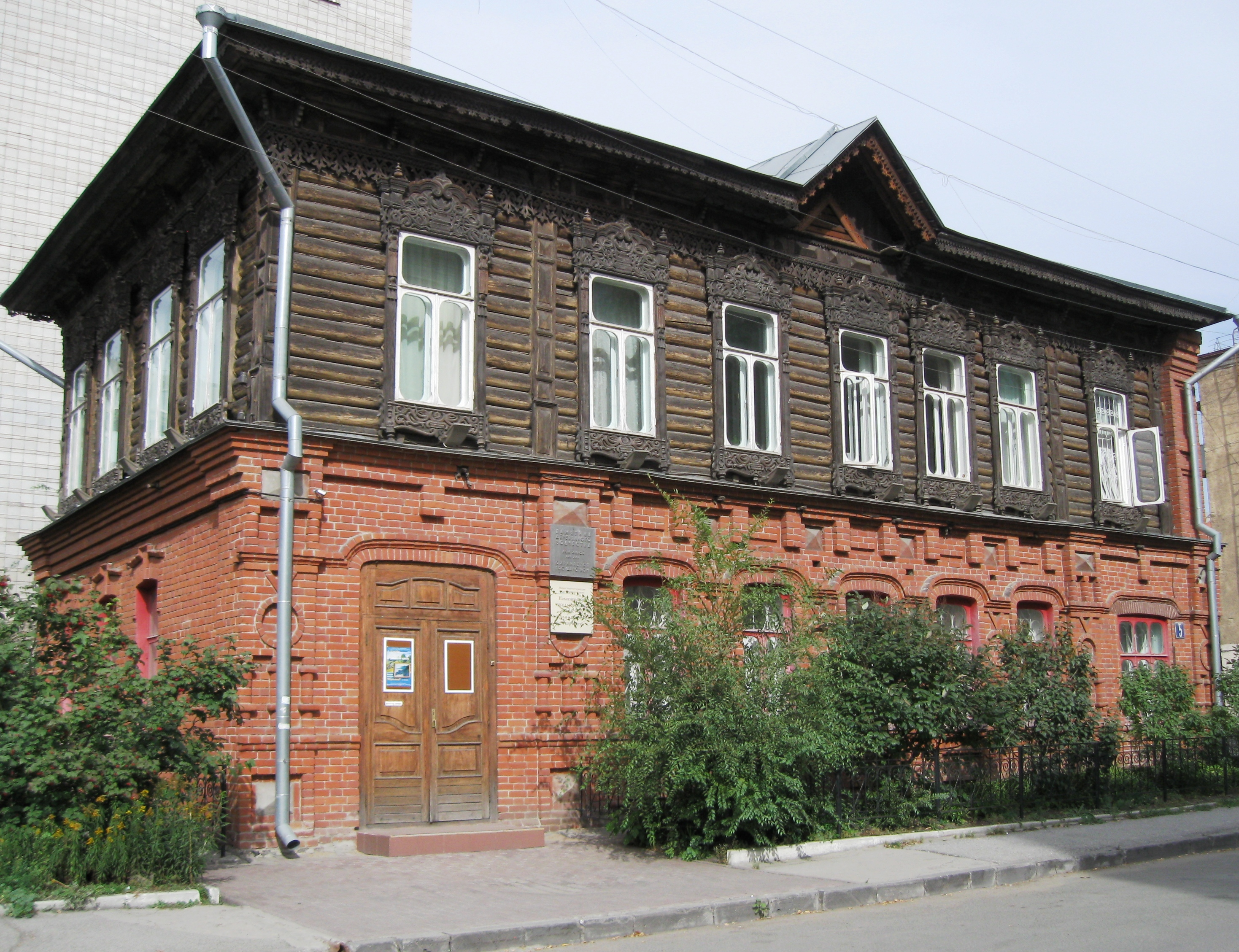 Памятник деревянного зодчества. Дом жилой начала 20 века.